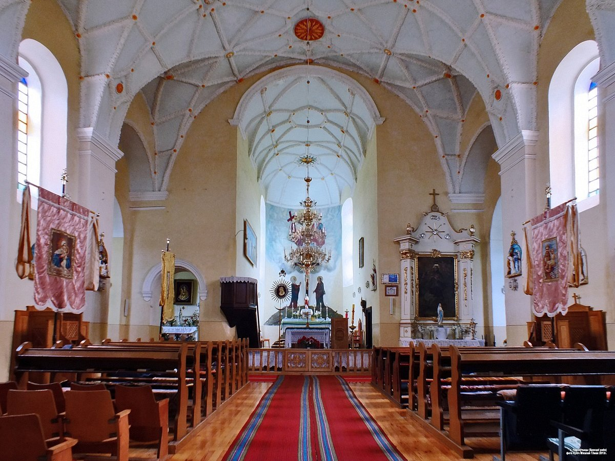 Чарнаўчыцы. Троіцкі касцёл. Інтэр'ер